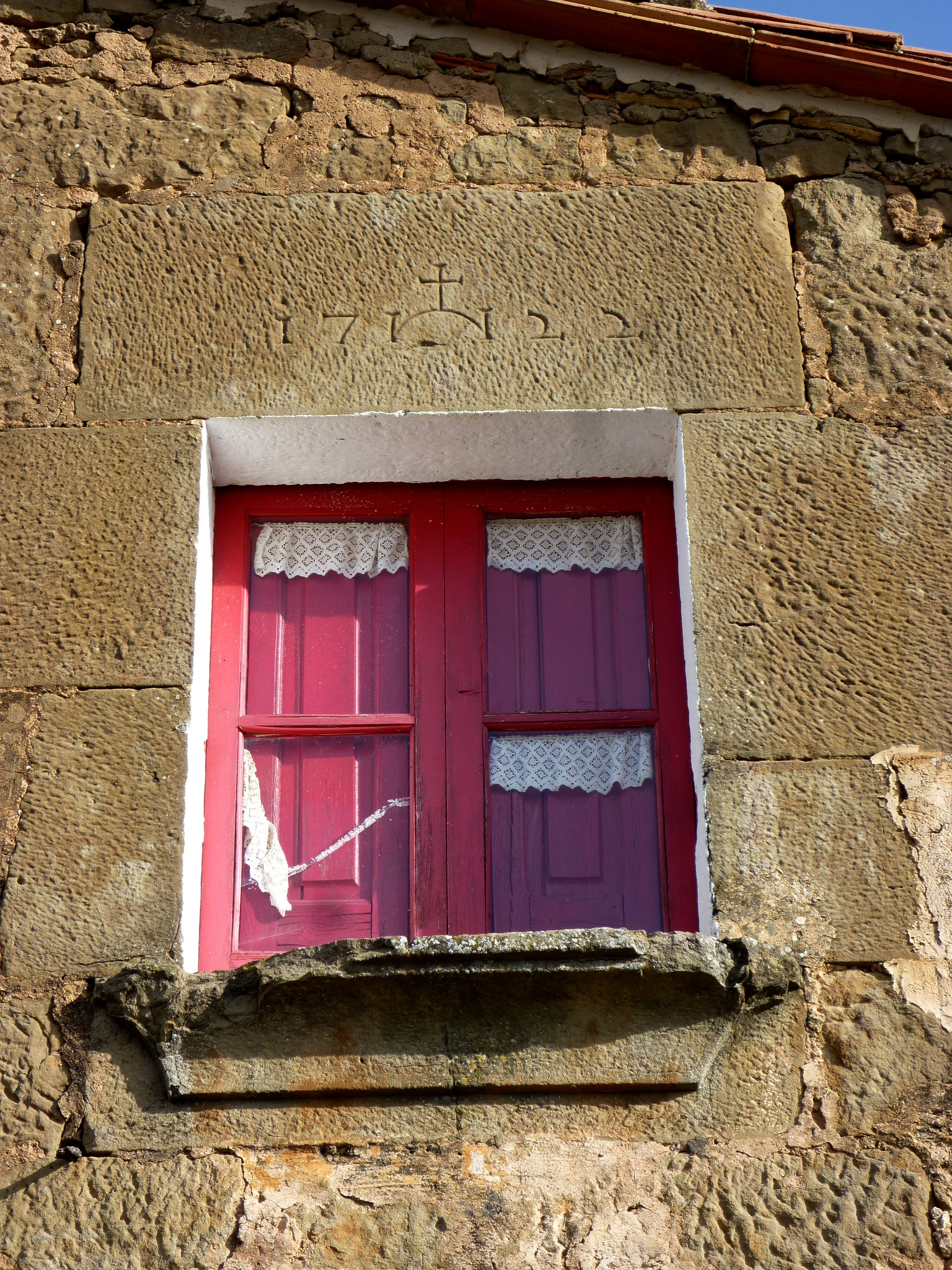 Cal Frare de les Cases de la Serra (Torrefeta i Florejacs): finestra amb data inscrita